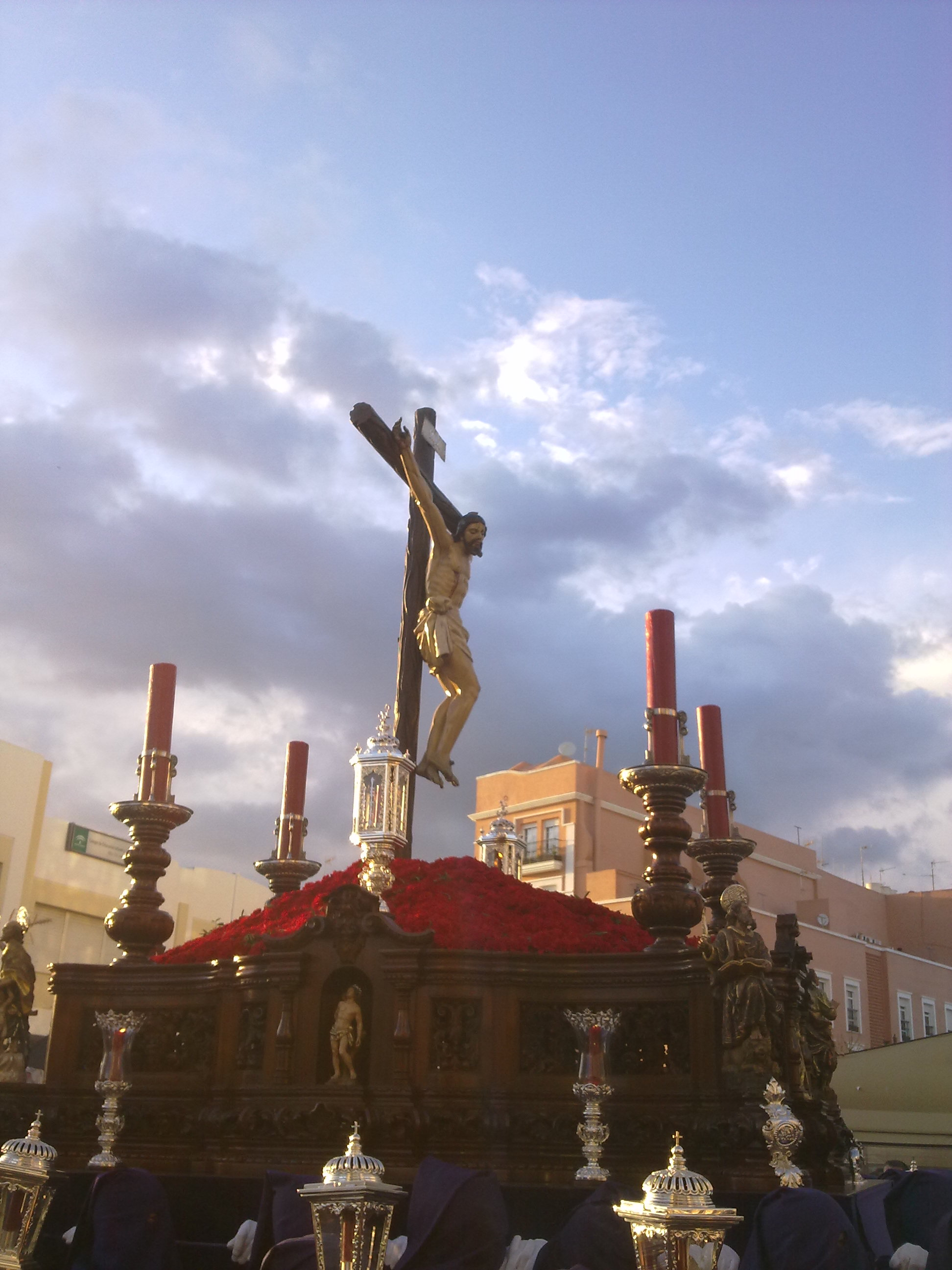 Cristo de la Vida, que procesiona en la Semana Santa de Isla Cristina en la tarde del Viernes Santo